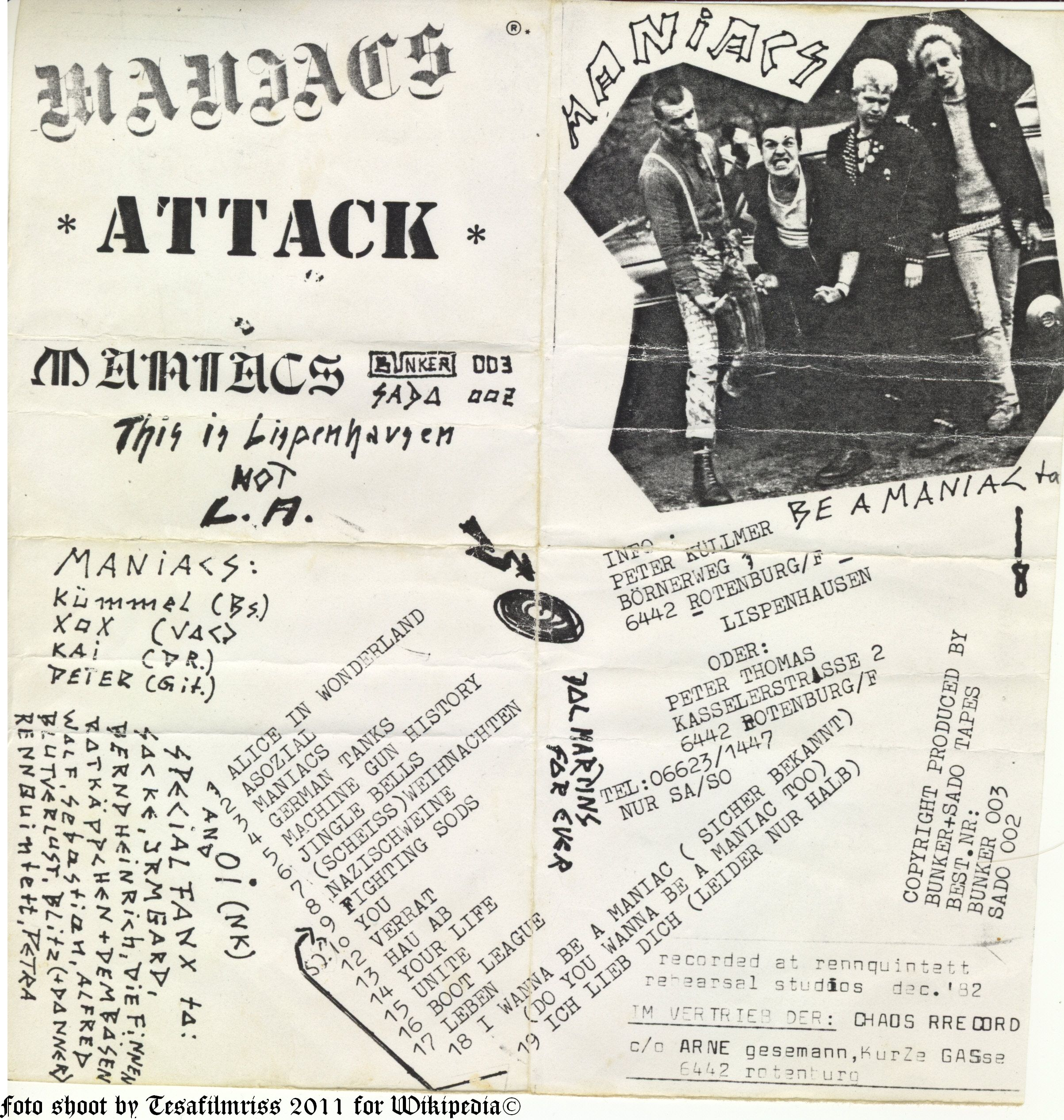 Foto - Cover - Maniacs - Attack - Demo MC